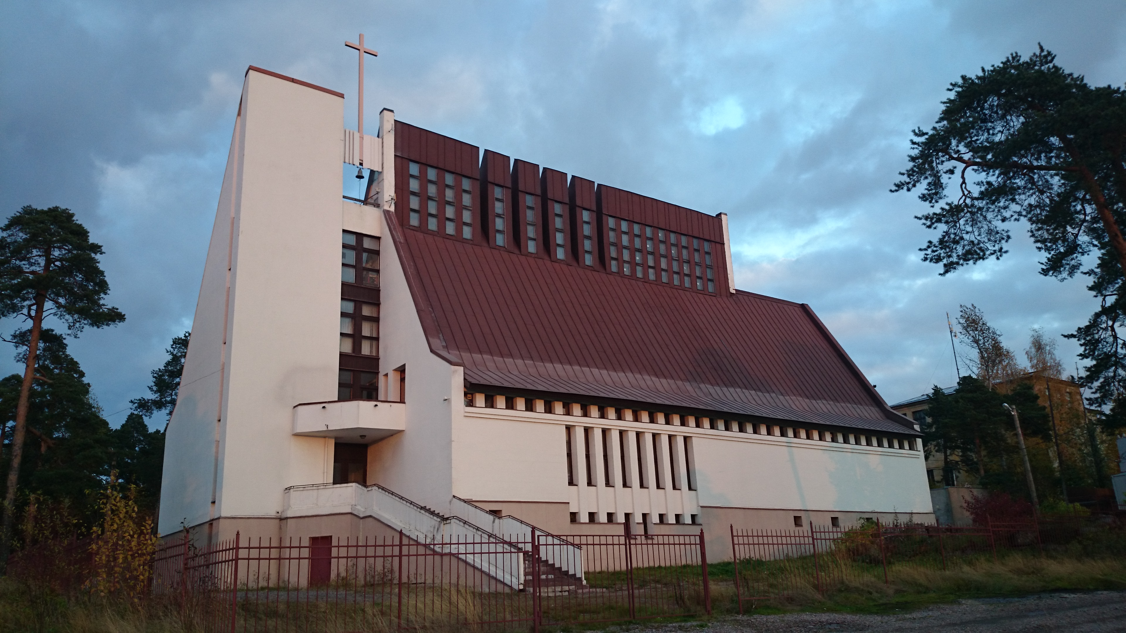 Церковь баптистов